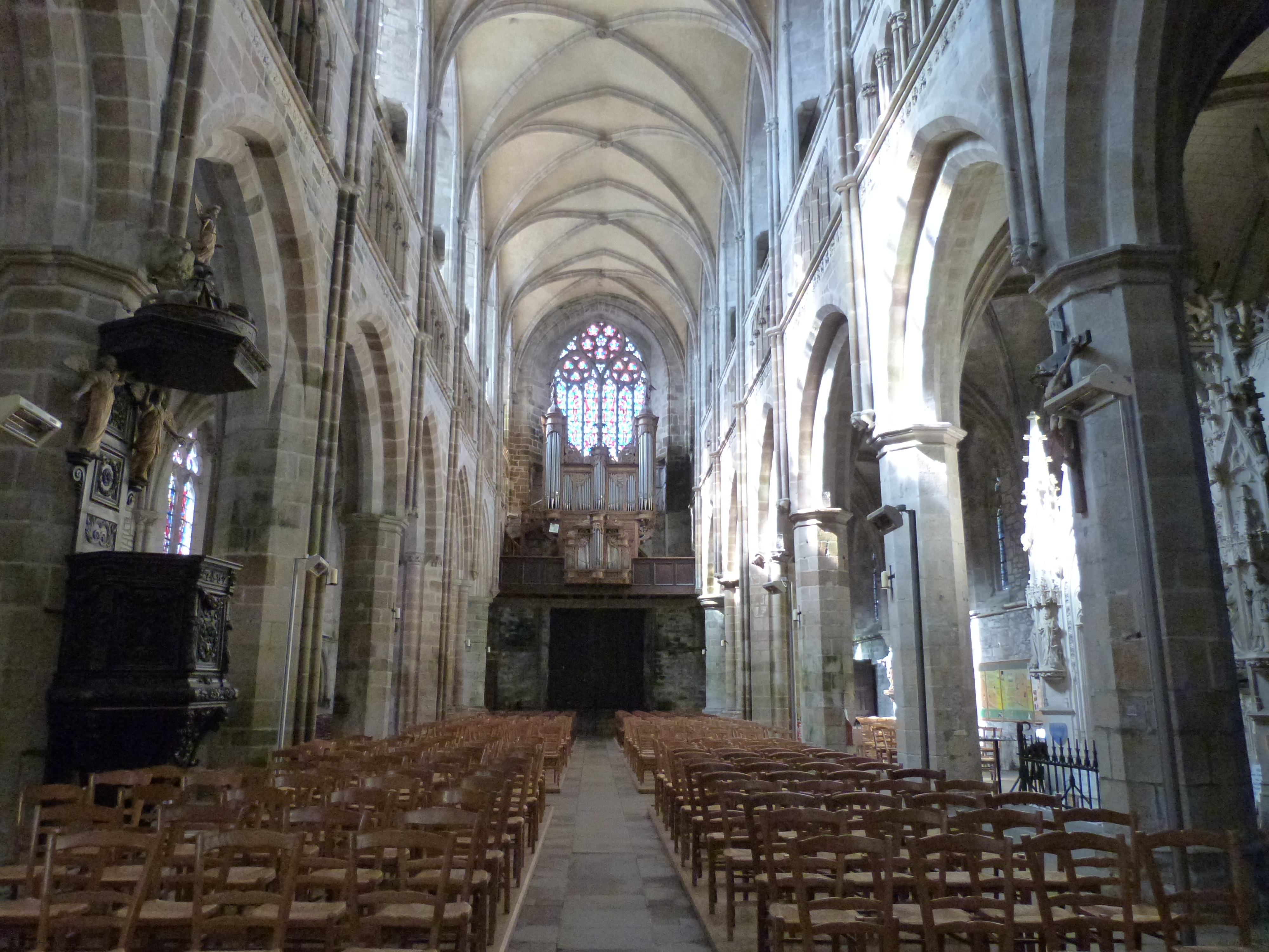 Nef, orgue et vitrail du porche occidental de la cathédrale de Tréguier